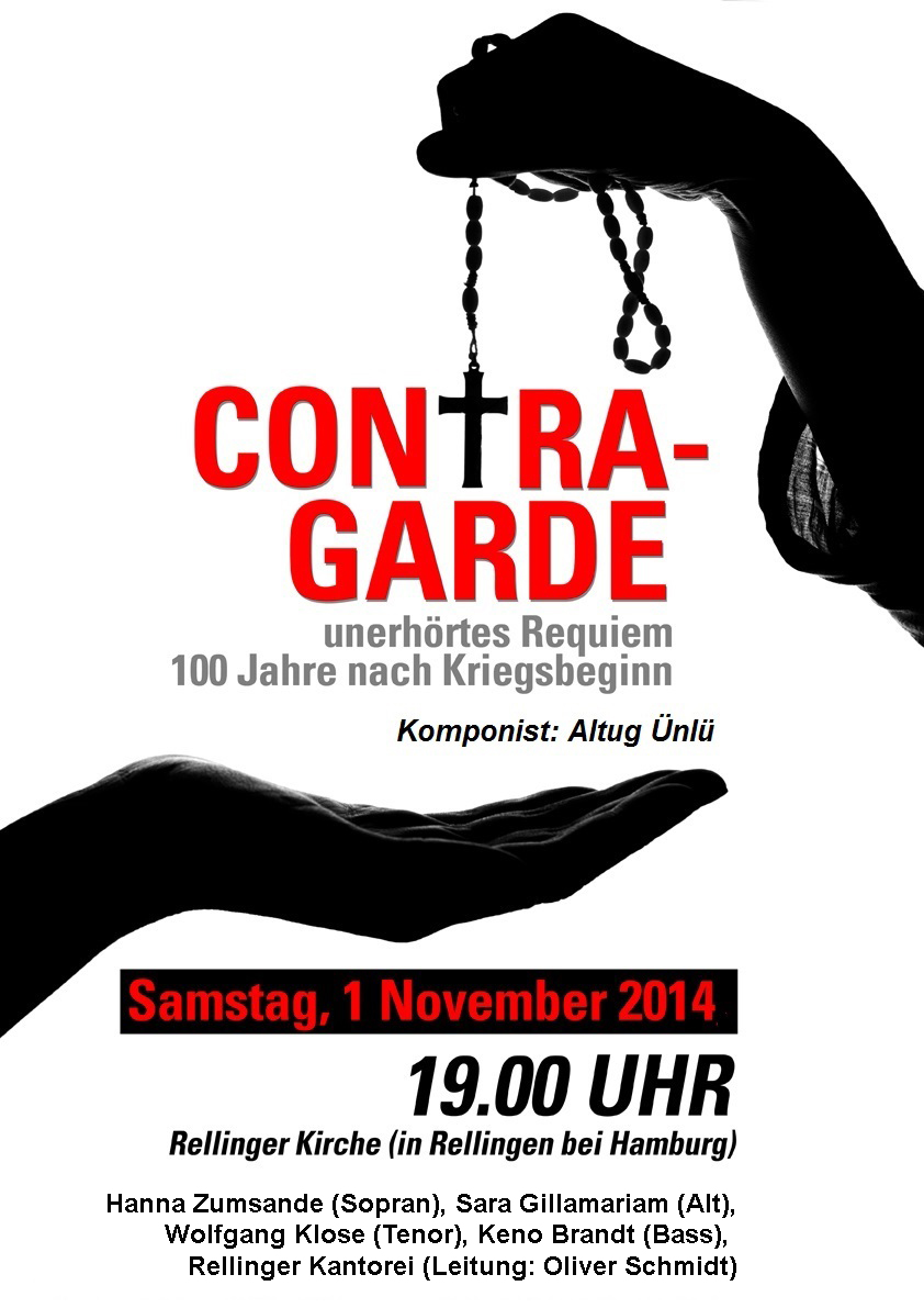 ein Flyer zur Ankündigung der Uraufführung